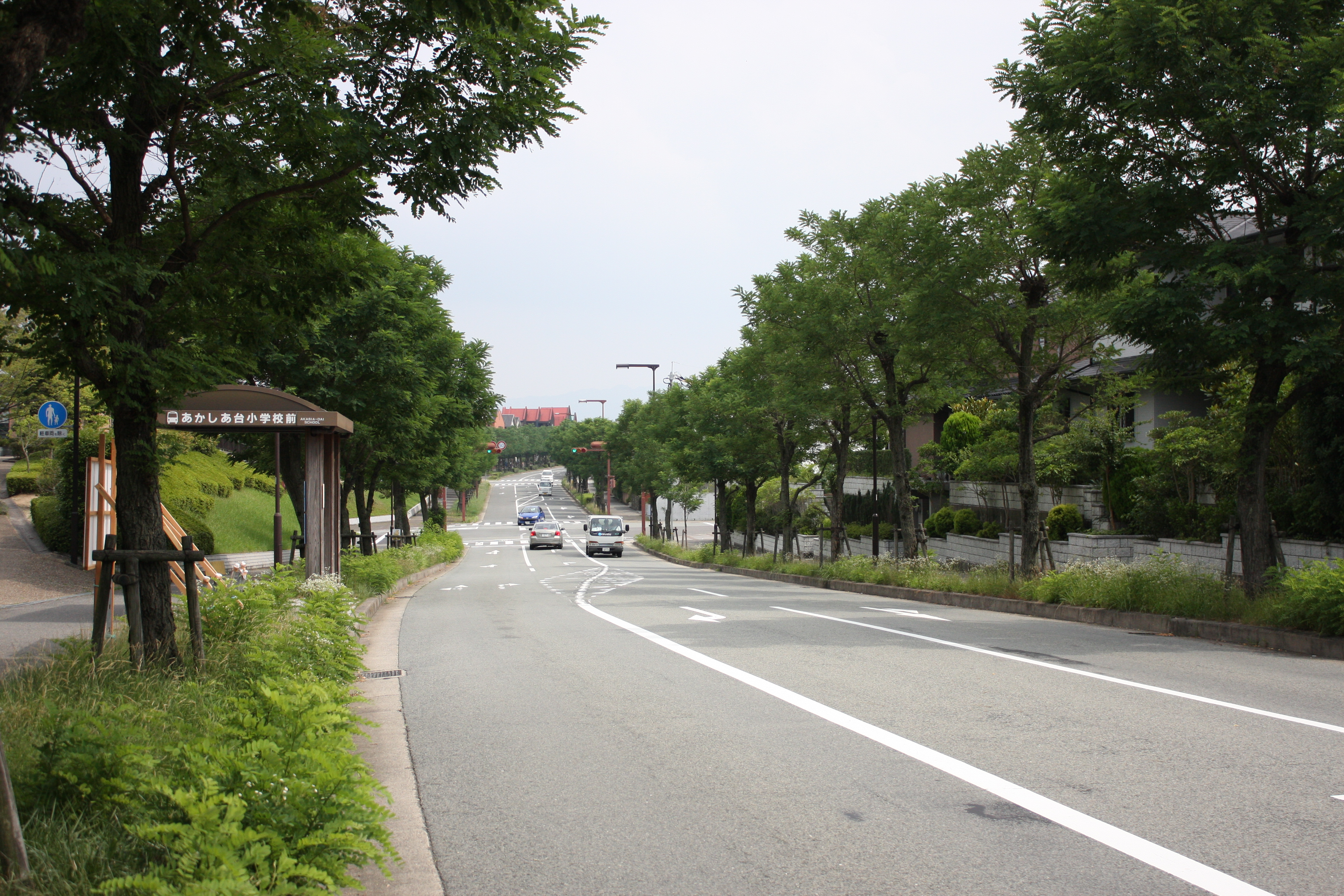 ウッディタウン 街風景